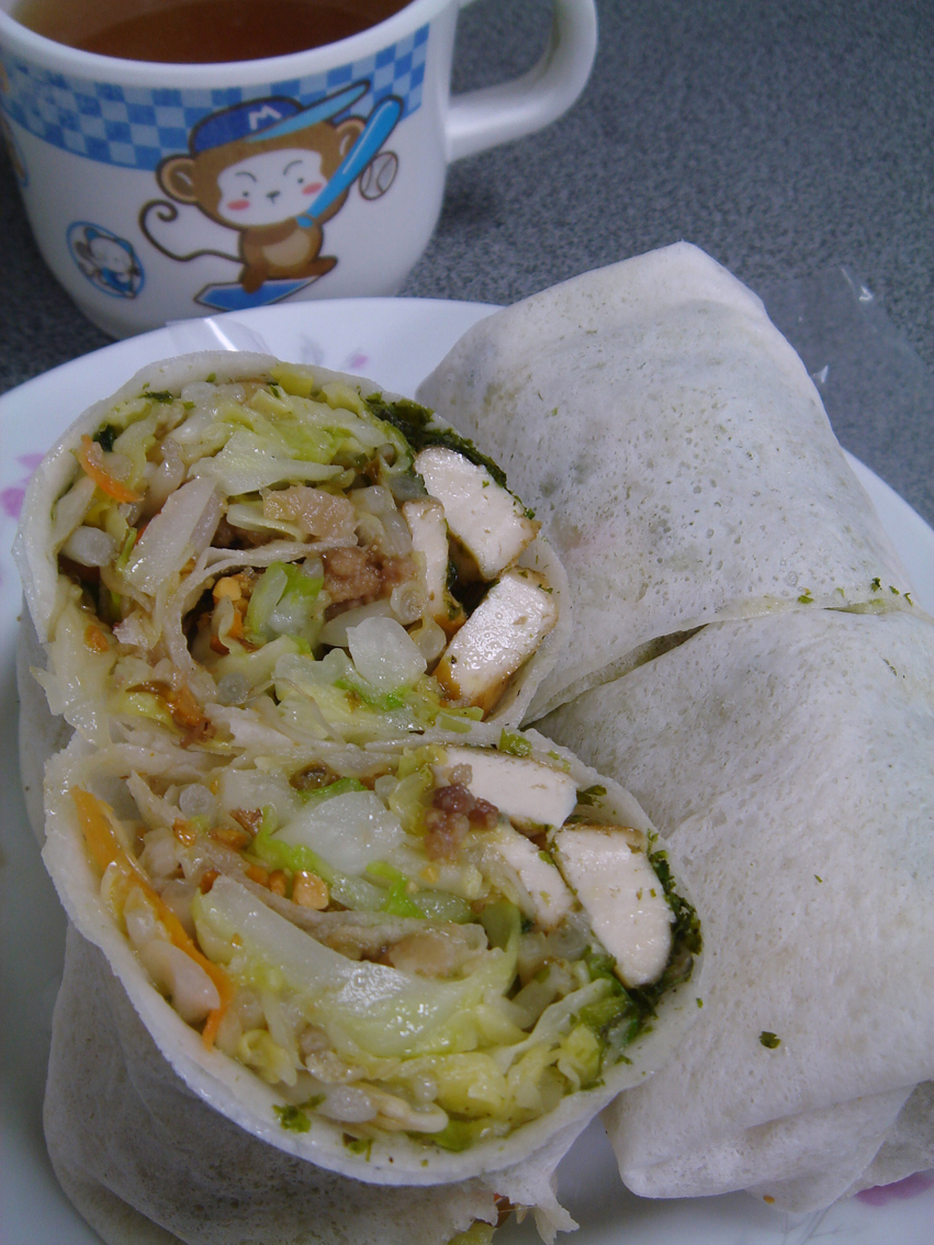 中文（台灣）: 台灣的潤餅